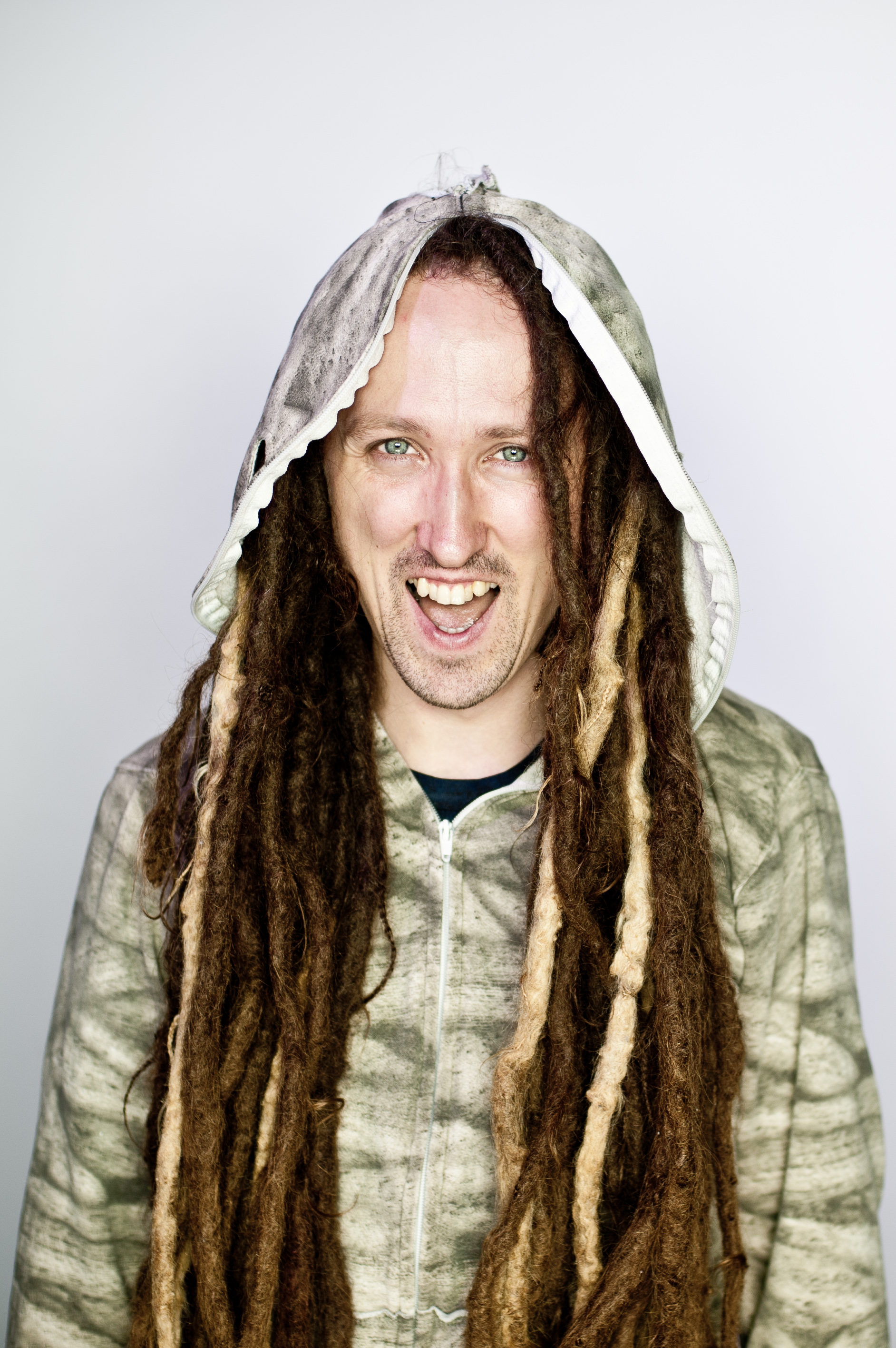 Zebbler